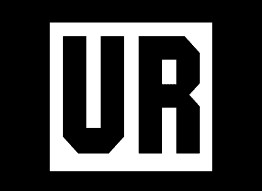 Logo del sello discográfico y colectivo de techno Underground Resistance